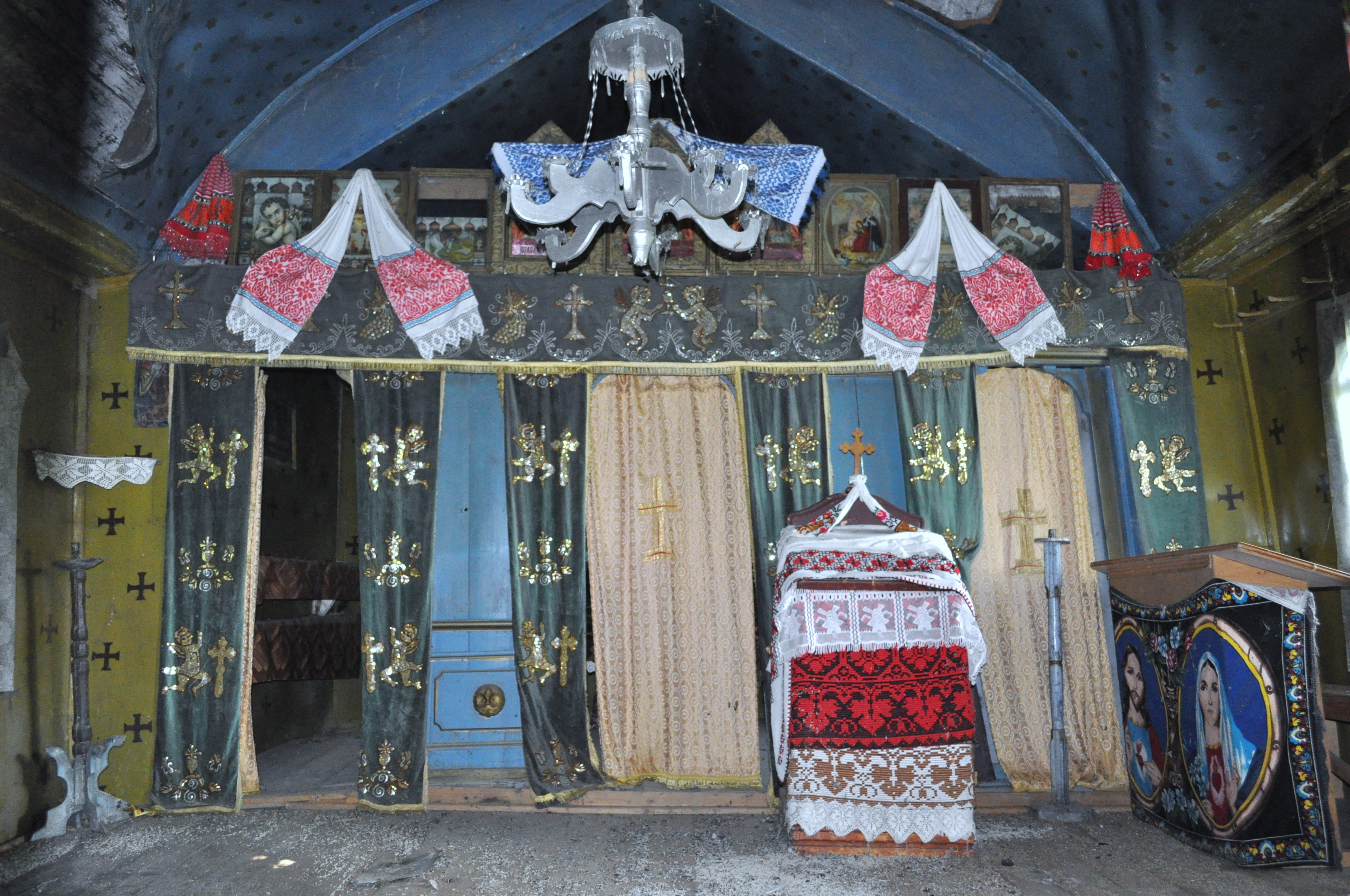 Biserica de lemn "Sf. Ioan Botezătorul" , sat COMLOD; comuna MILAŞ